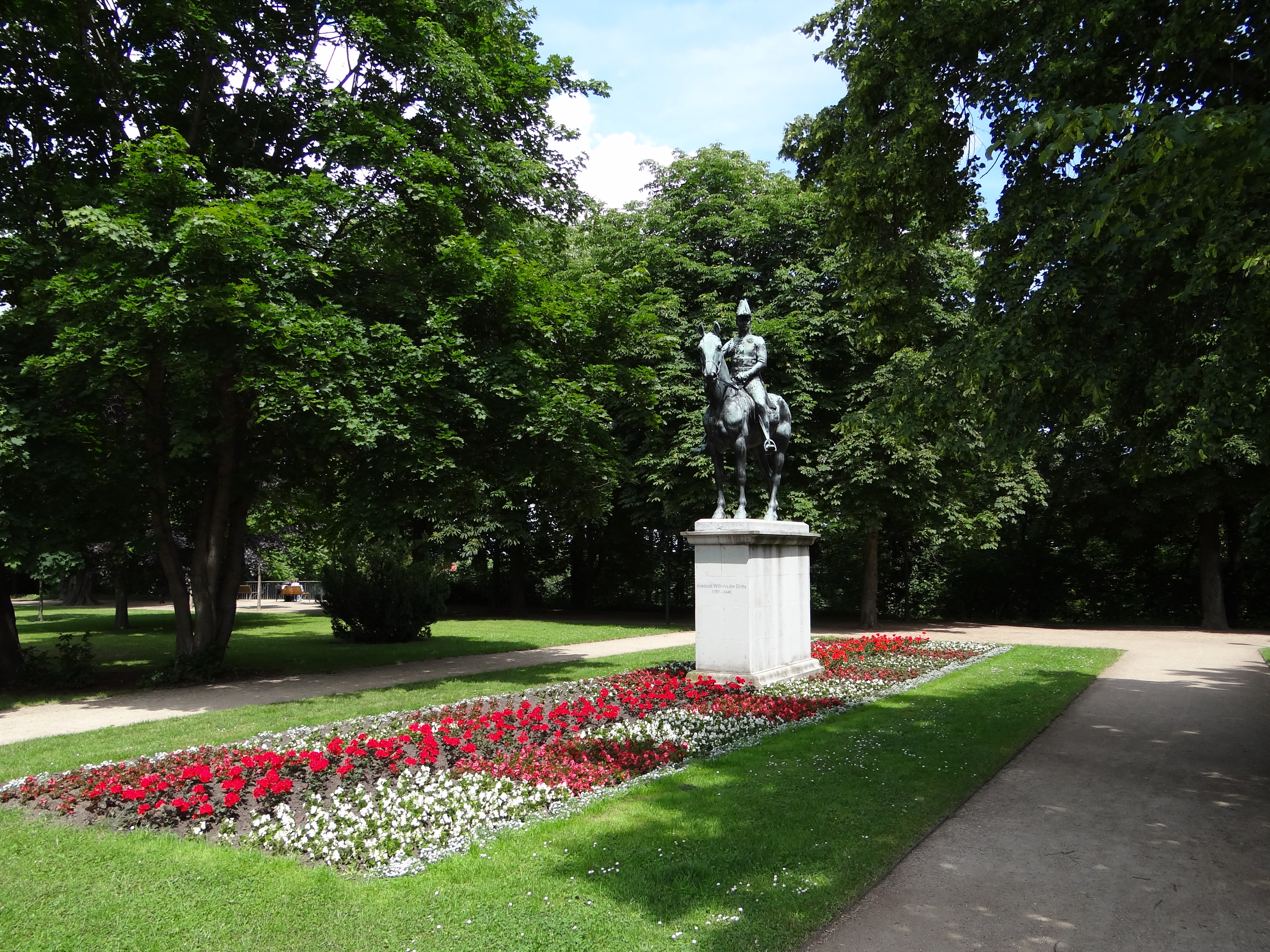 Merseburg, Germany